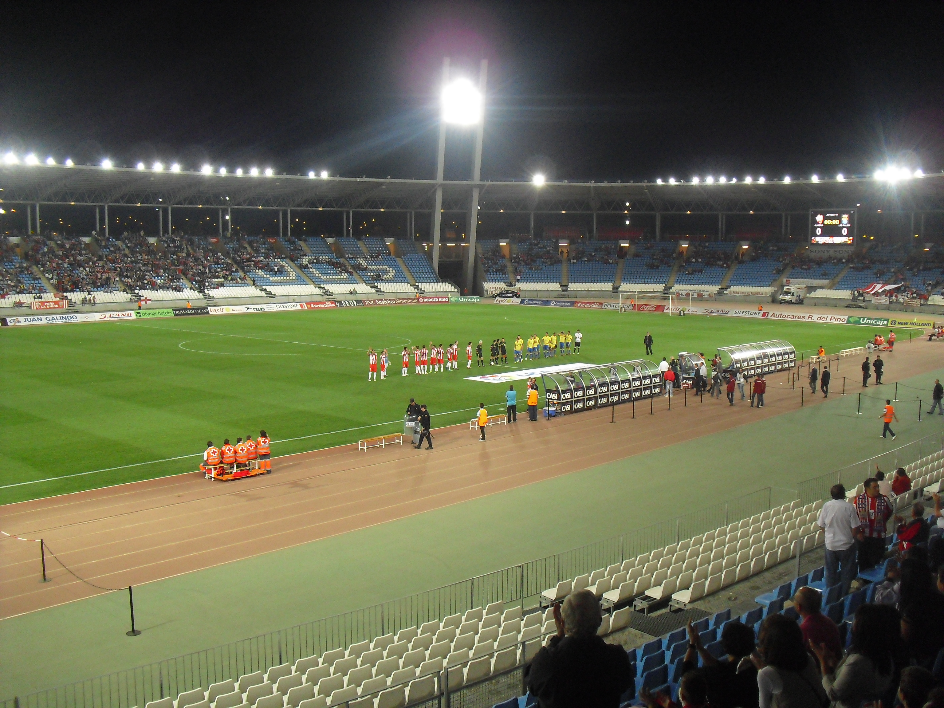 estadio mediterraneo de almeria